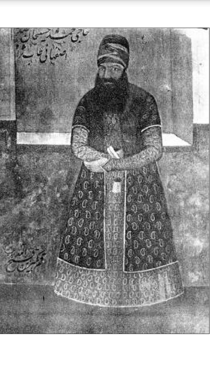 صورة للأمير محمد حسين خان الصدر الأعظم